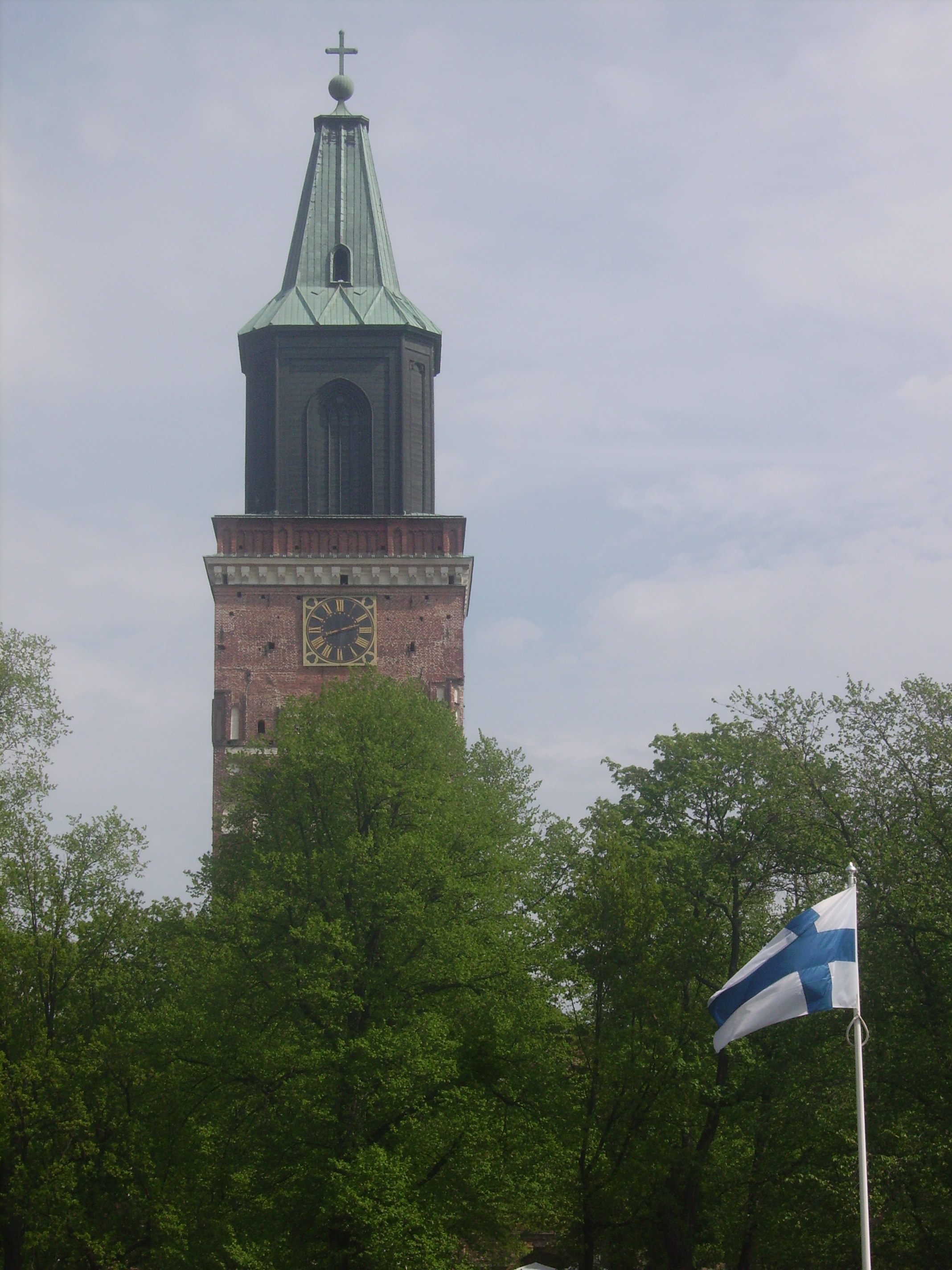 Turun tuomiokirkon torni.